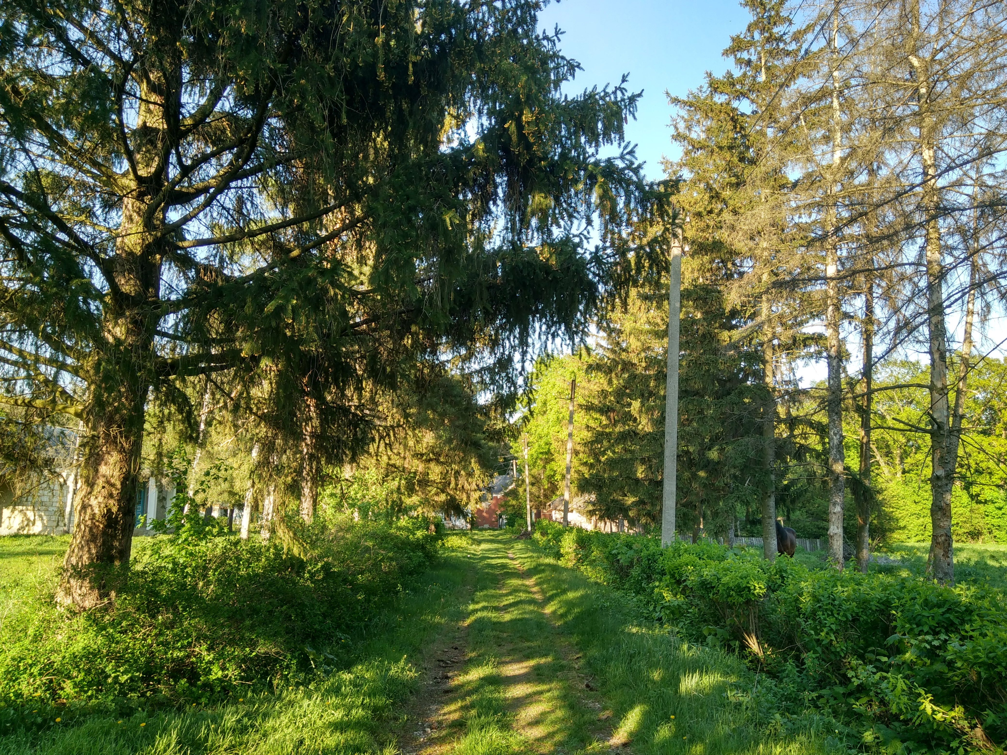 Parcul din satul Hincăuți, monument al naturii amplasat în raionul Edineț, satul Hincăuți (cod MD-ED-map-014)